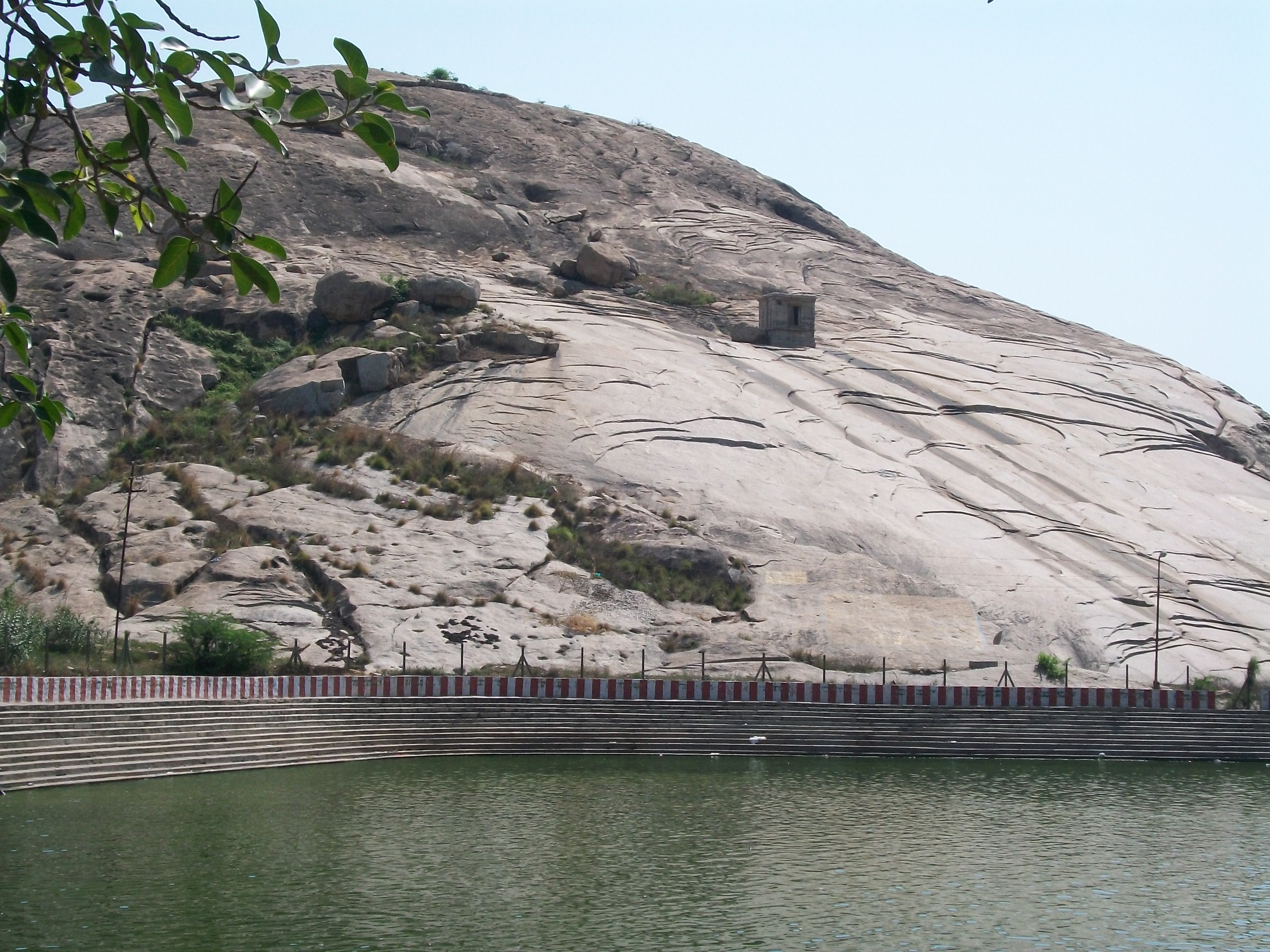 iyarkai katchi